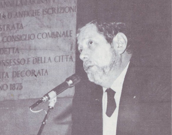 Il medico legale Paolo Giaccone, ucciso dalla mafia l'11 agosto 1982 nel Policlinico di Palermo.